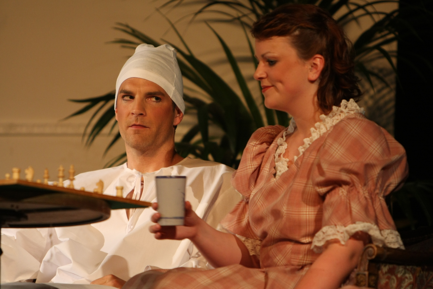 Schauspieler Norman Kalle zusammen mit Stefanie Hehn in dem Comedy Musical Die Lokalbahn von Thorsten Wszolek, sehr freu nach Ludwig Thoma, Mund Art Theater, Premiere 21. Juni 2008